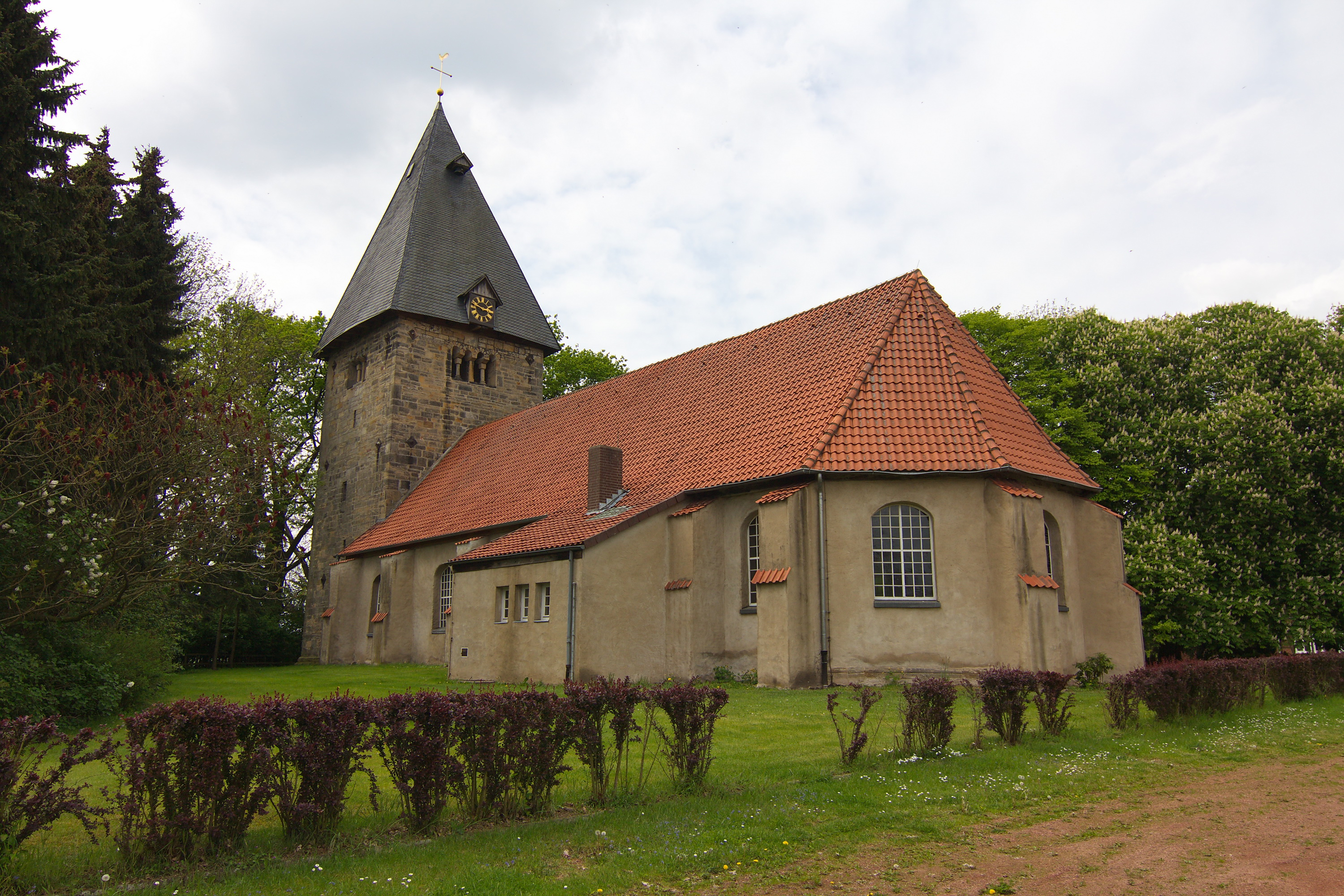 Kirche in Basse (Neustadt am Rübenberge), Niedersachsen, Deutschland.